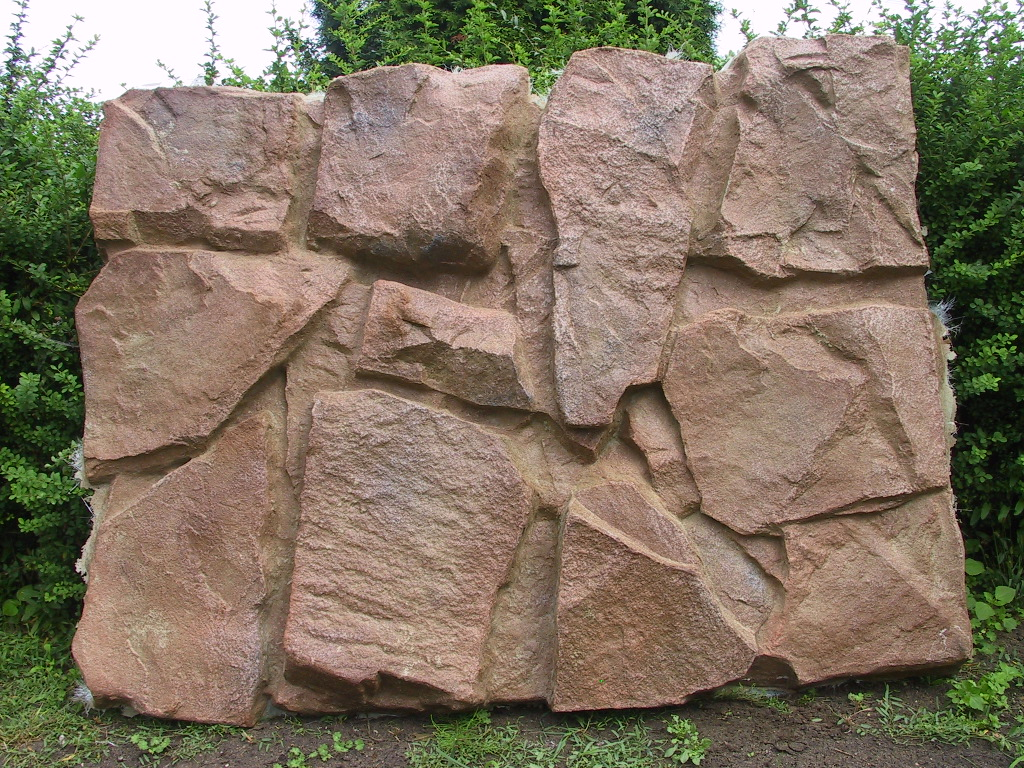 Zdjęcie produktu felsdekor wyprodukowanego z formy silikonowej